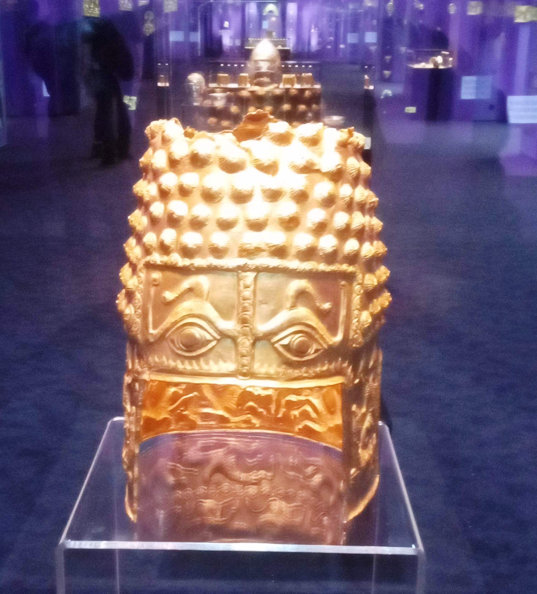 Національний історичний музей Румунії.Виставка історичних скарбів.